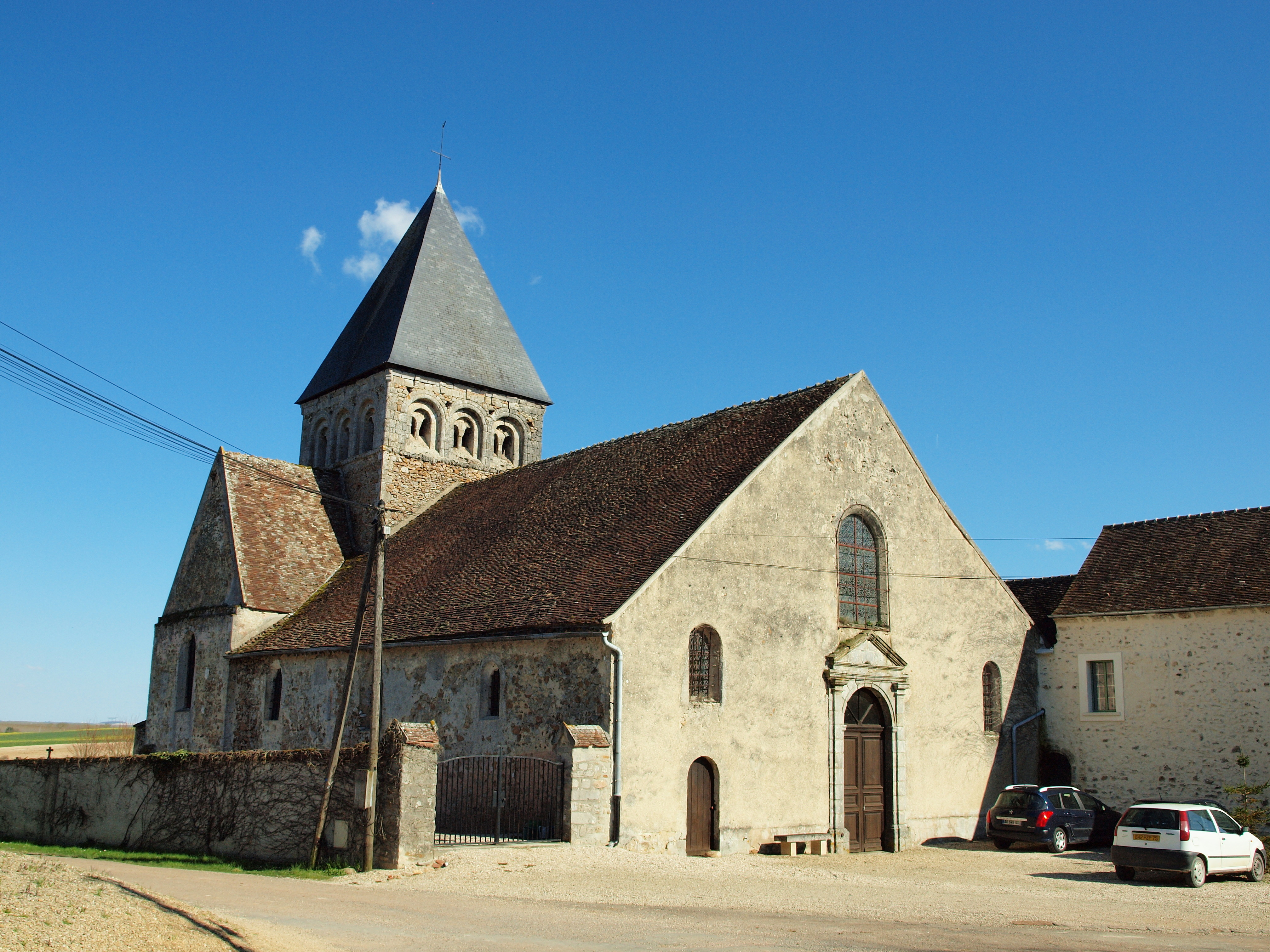 Église Saint-Nicolas de Saint-Nicolas-la-Chapelle ( Aube, France)